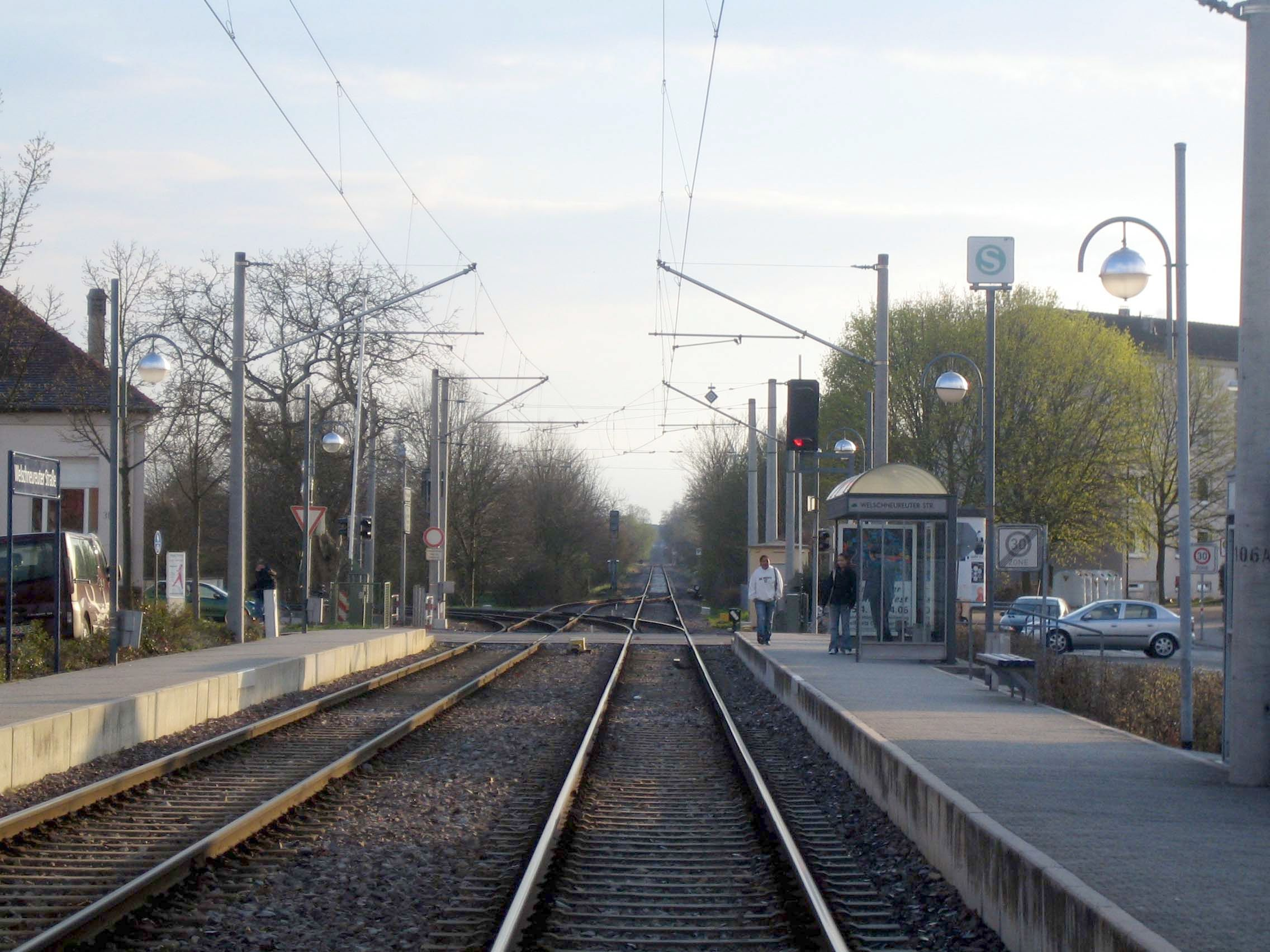 Hp. "Welschneureuter Str.", selbst fotografiert 00:49, 13. Apr 2006 Antifaschist 666 2272 x 1704 (1020041 Byte) (Hp. "Welschneureuter Str.", selbst fotografiert)